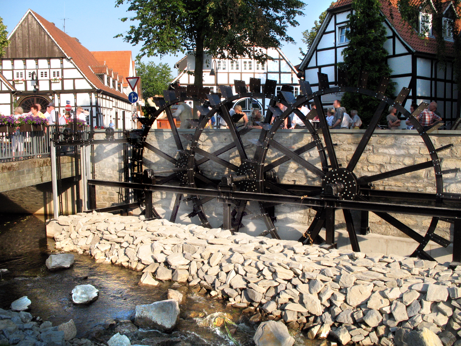 Rheda-Wiedenbrück, Neue Mühle